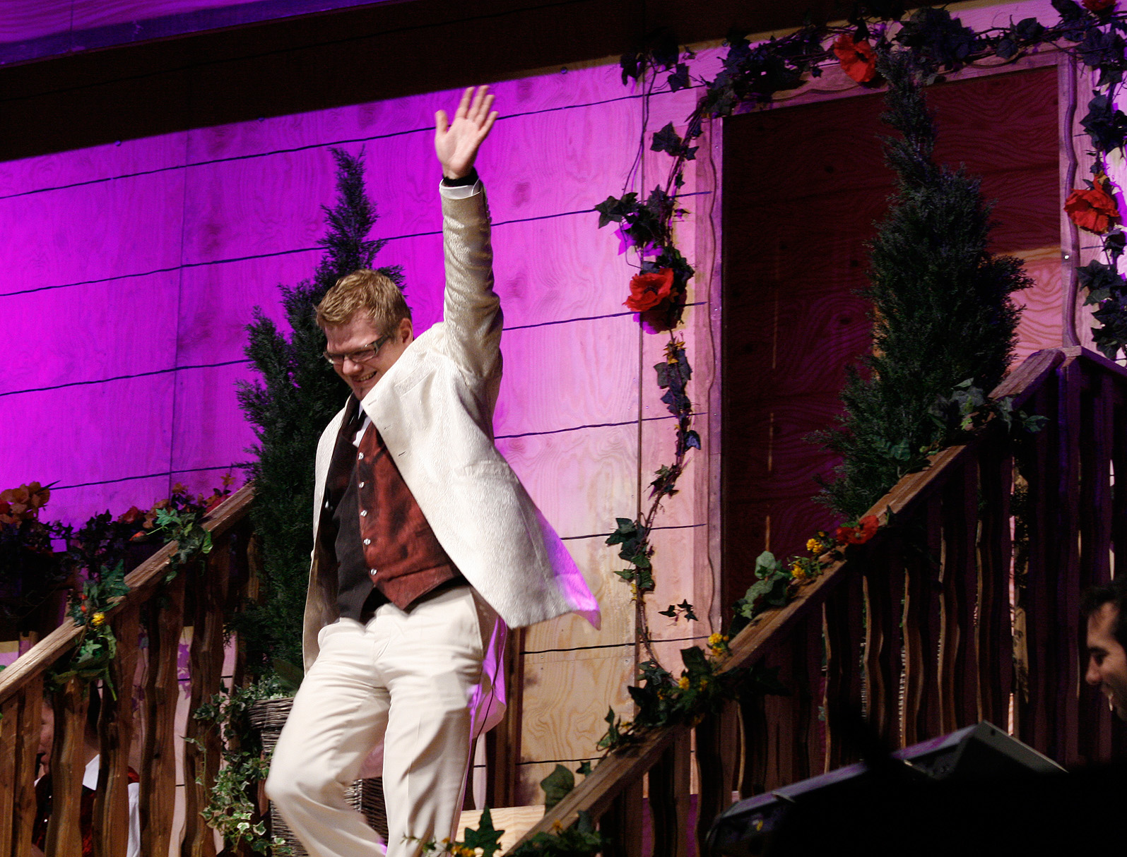 Wolfgang Lindner junior mit der Musikantenstadl-Tournee in der Wiener Stadthalle.